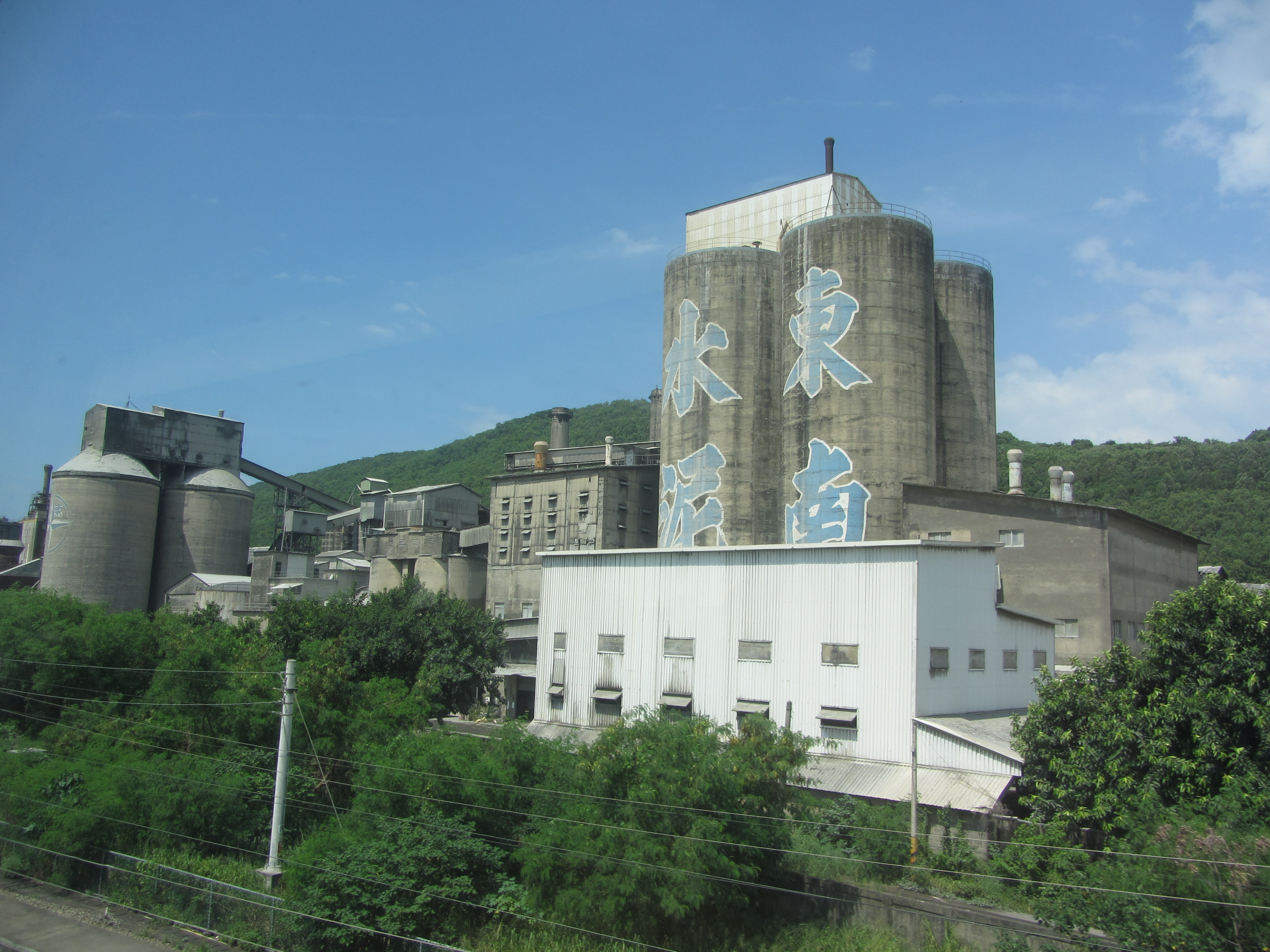 高雄市半屏山旁的東南水泥高雄廠。